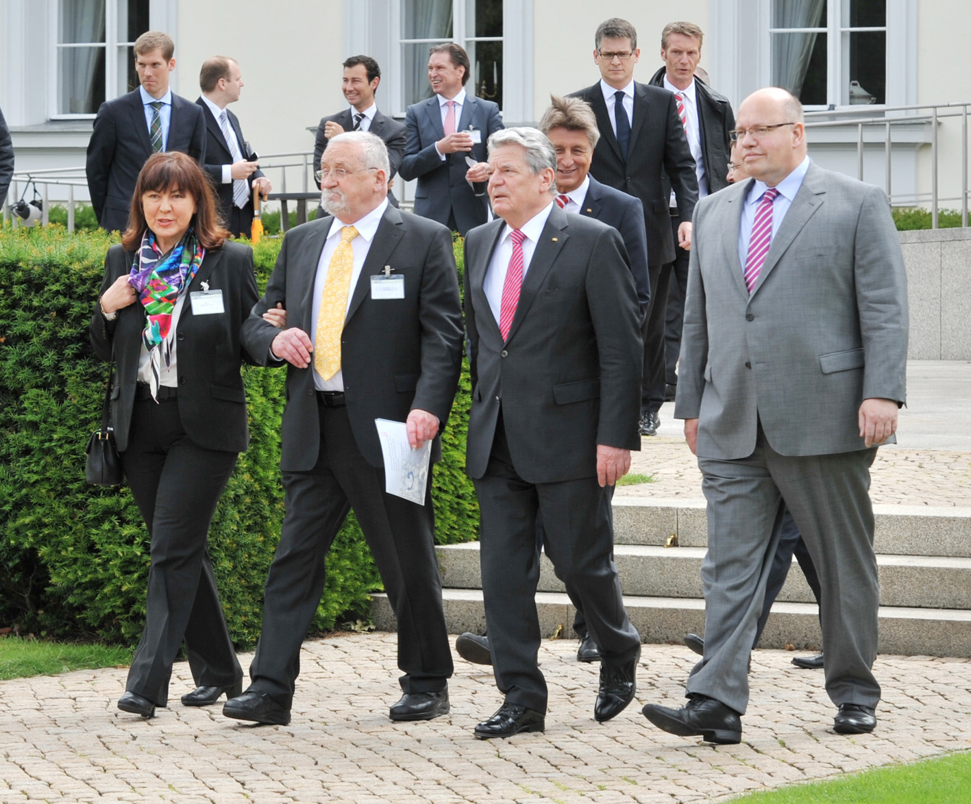 Woche der Umwelt 2012 Auf Einladung des Bundespräsidenten Joachim Gauck präsentierte sich die EnergieAgentur.NRW bei der „Woche der Umwelt“ vom 5. bis 6. Juni 2012 im Park vom Schloss Bellevue. Energiemanagement, Elektromobilität und ein Forum zum Thema „Energie- und klimabewusstes Verhalten“ standen im Mittelpunkt der Präsentation. Flickr tags: Bundespräsident; Joachim Gauck; EnergieAgentur.NRW; Klimaschutz; Woche der Umwelt; 2012; Elektromobilität; Schloss Bellevue